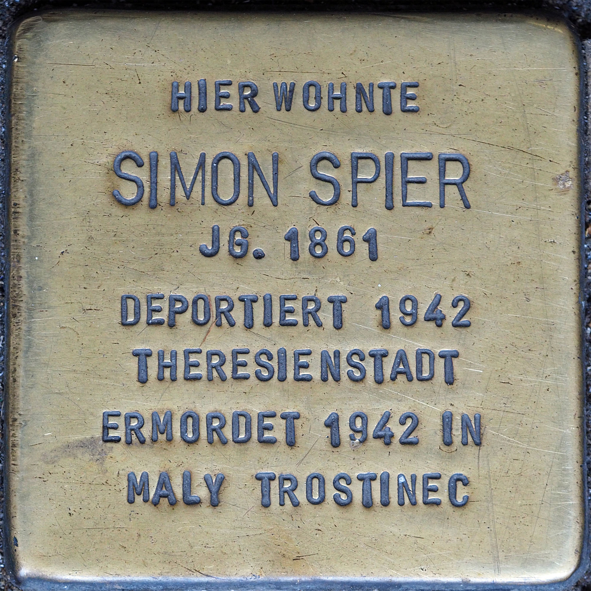 Stolpersteine MG: Spier, Simon